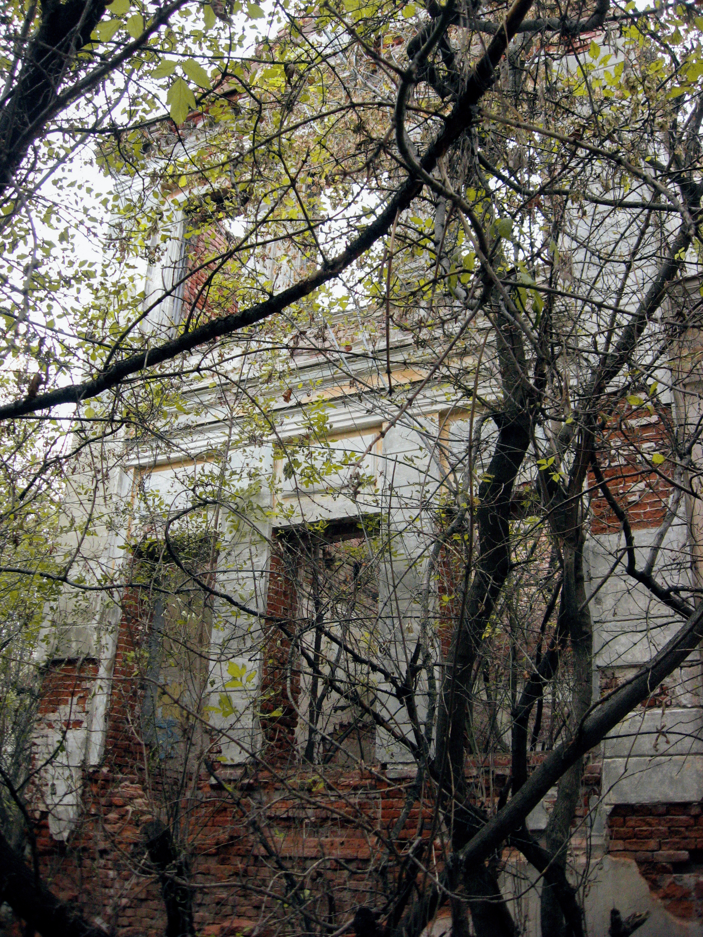 Усадьба